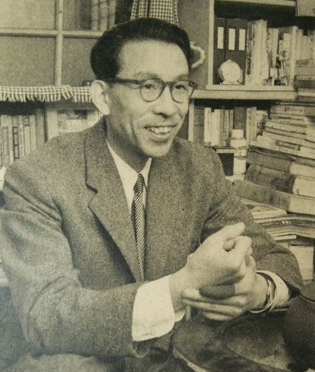 乾信一郎